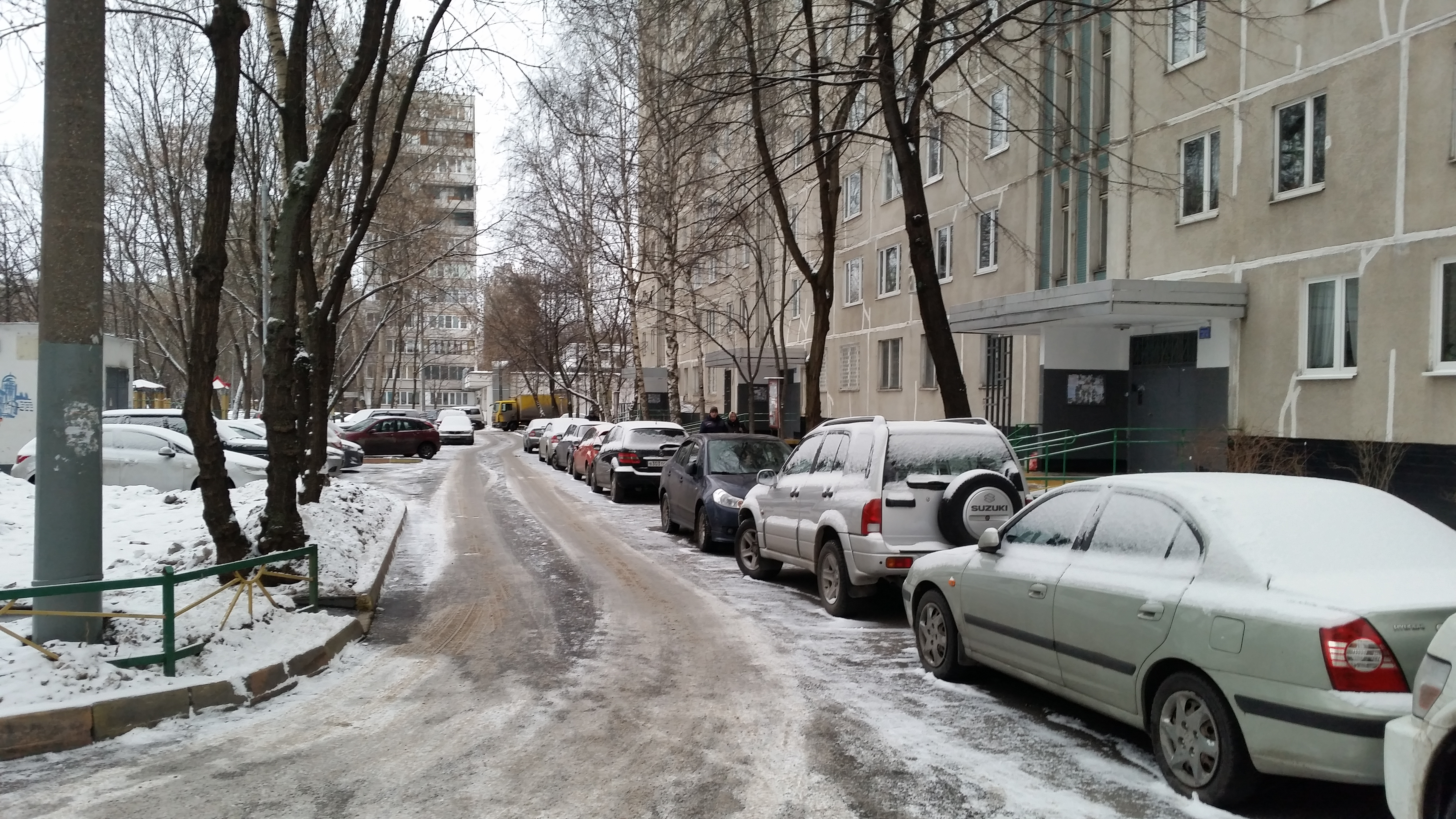 Место съёмок фильма "Вам и не снилось..." 1980 года. ул., Енисейская дом 21